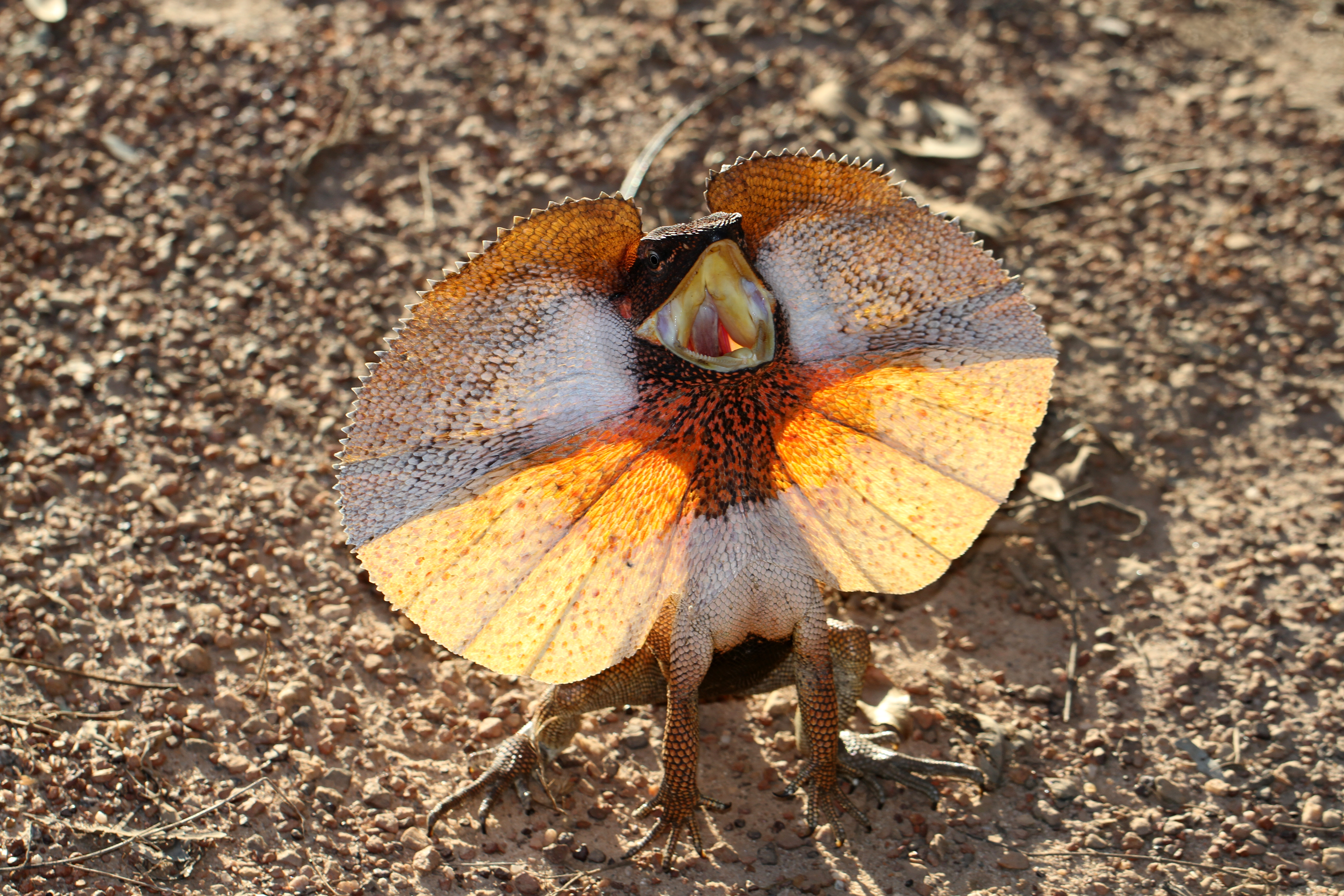 Kakadu NT